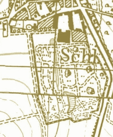 Lage und Ausdehnung von Gutshof, Schloss und -park Molsdorf bei Erfurt.